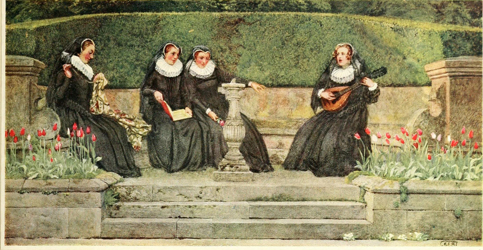 Illustration d' Helen of Kirkconnell par Eleanor Fortescue-Brickdale